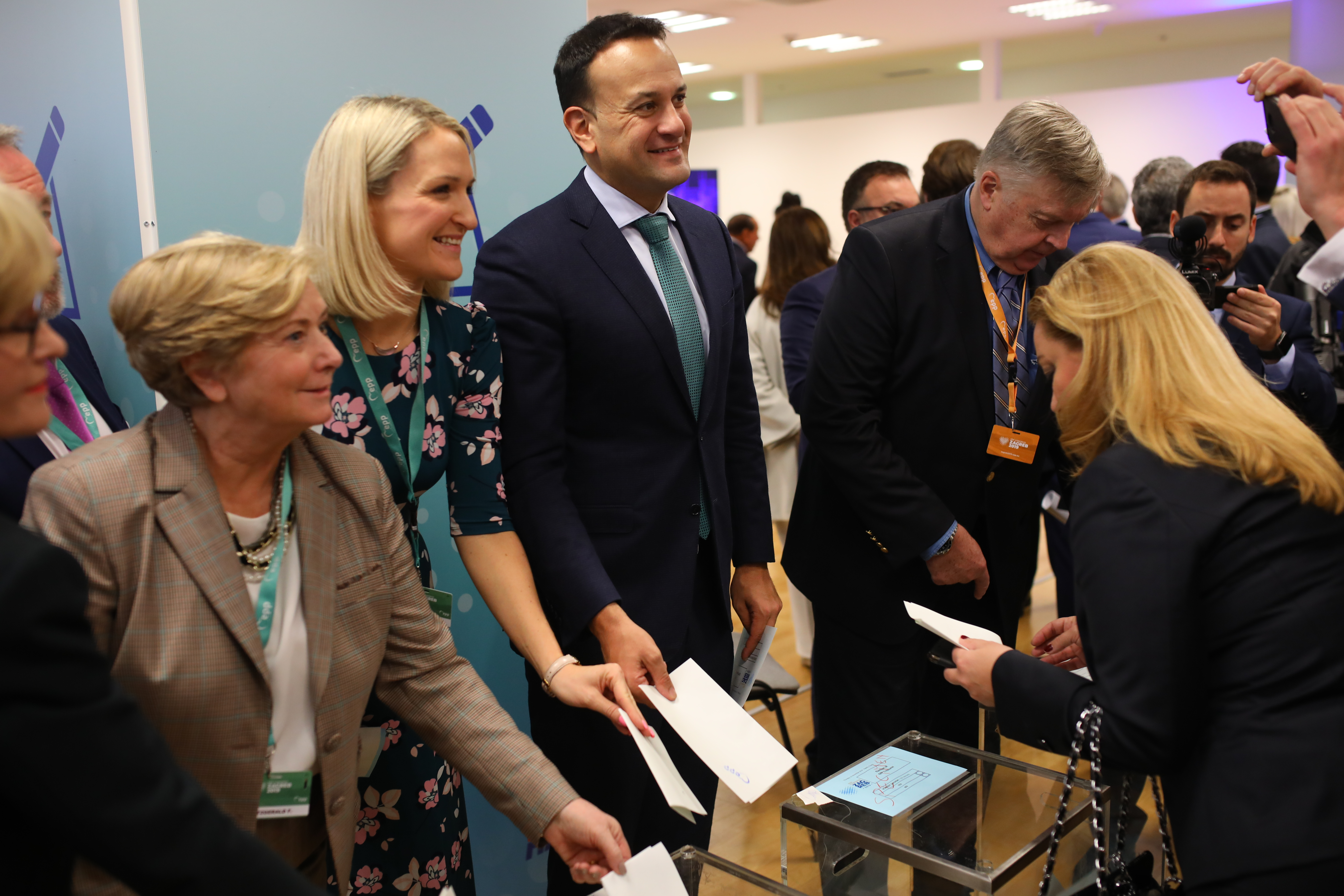 20-21 November 2019